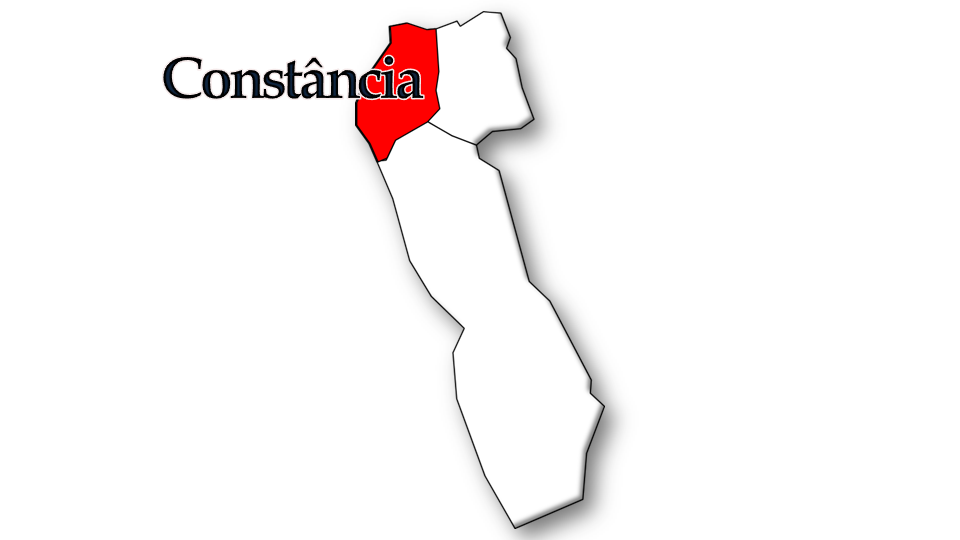 Evolução da População